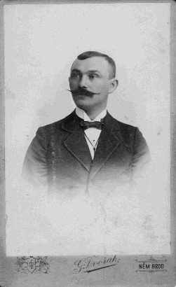 Jaroslav Choltický, český pedagog a spisovatel